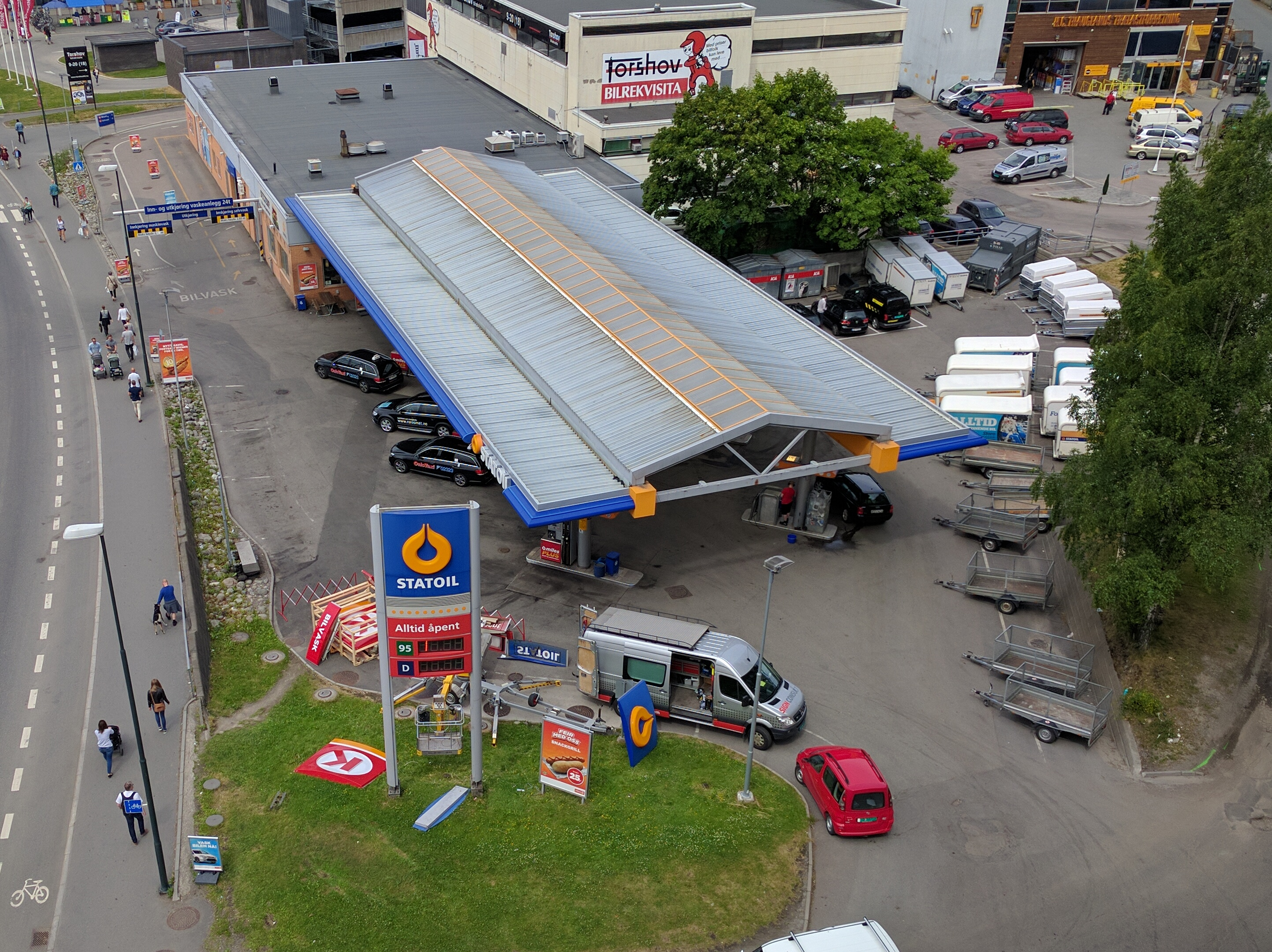 Omprofilering av Statoil-stasjonen på Storo til Cirkle-K